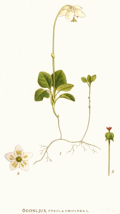 Moneses uniflora (L.) A. Gray, syn. Pyrola uniflora L. Original Description Ögonljus, Pyrola uniflora L.